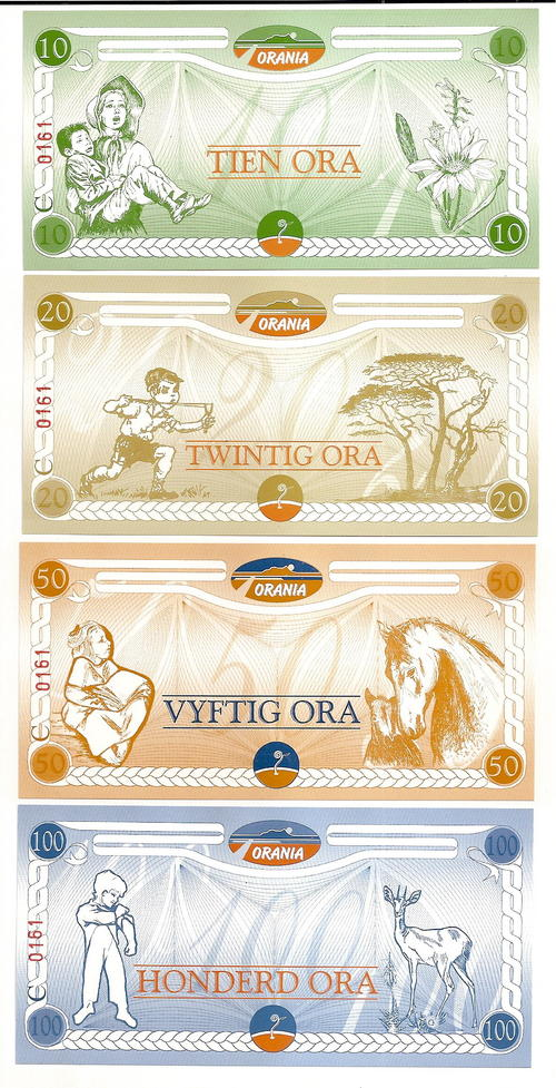 billets de 10,20,50 et 100 oras, utilisés à Orania